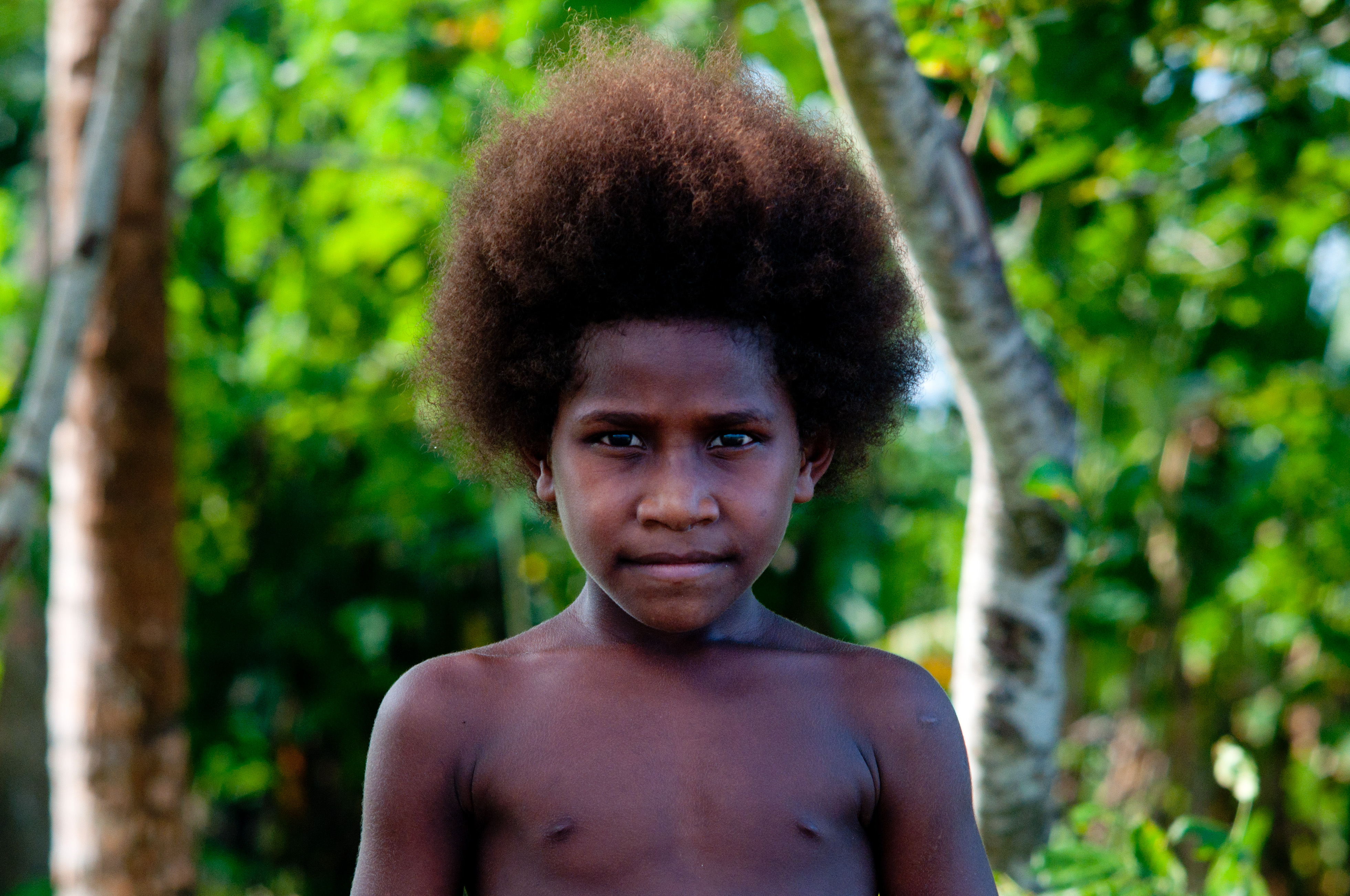 Boy